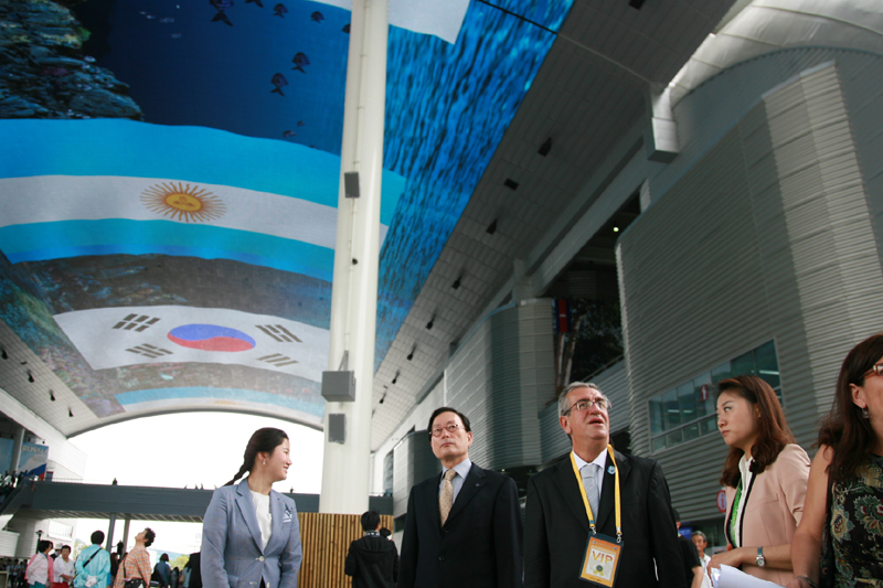 Yeosu, Corea. En la Galería digital de la Expo Yeosu, por la que transita el público al ingresar al predio, se proyectaron las banderas de Argentina y Corea, en el día nacional de nuestro país, el 25 de mayo.